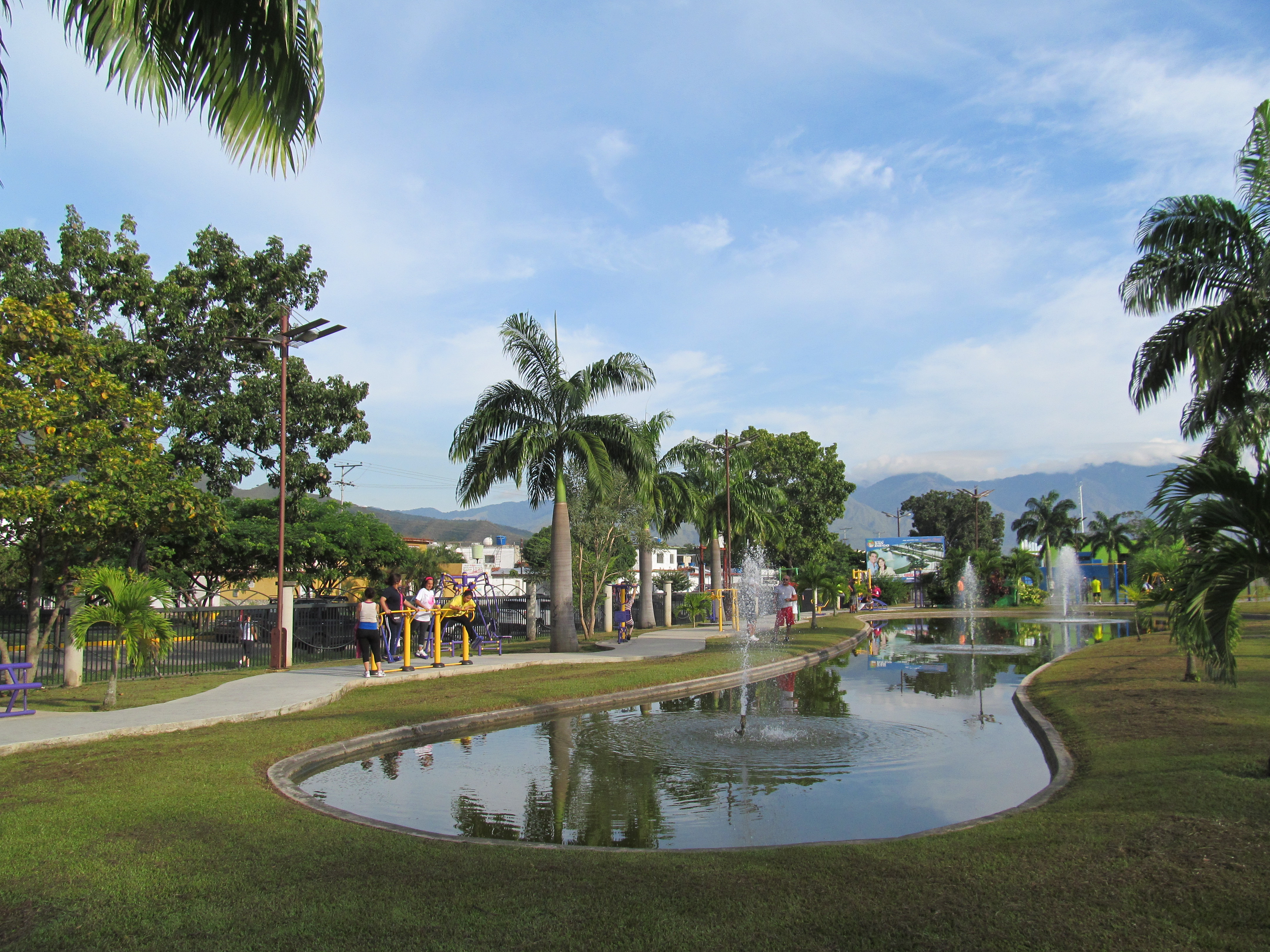 Parque Metropolitano San Diego, Edo. Carabobo